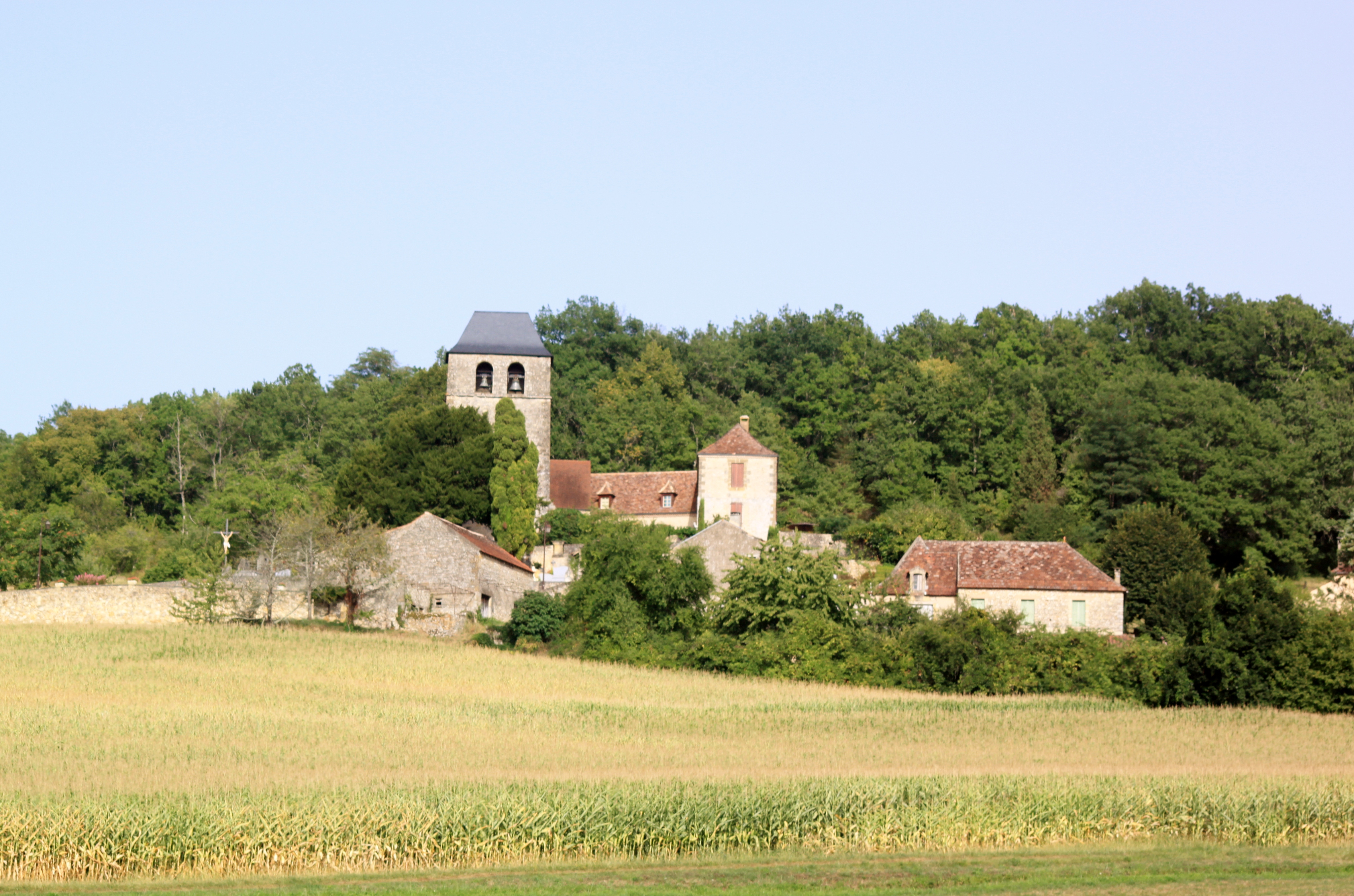 Le village de Marnac (Dordogne)